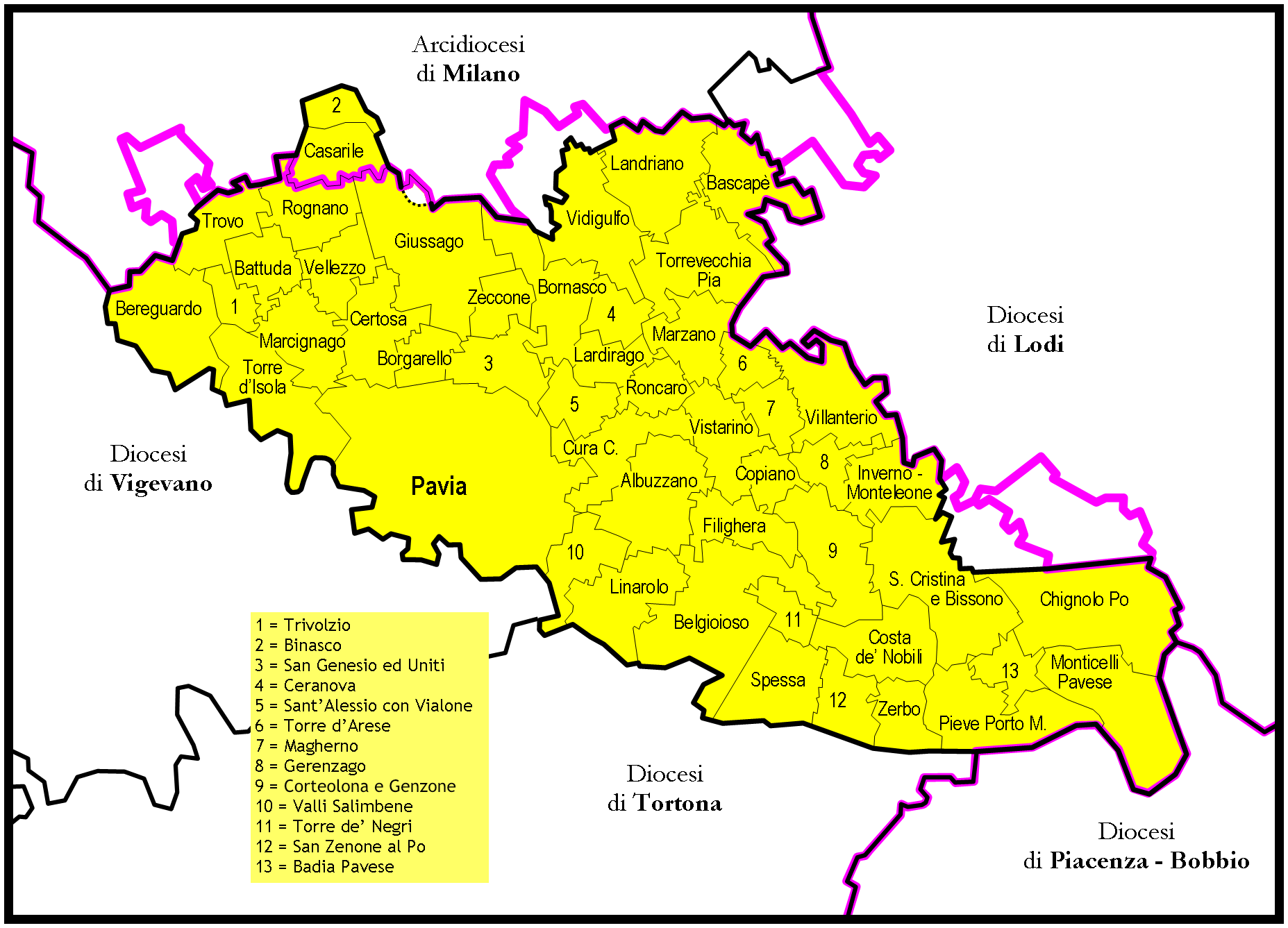 Mappa della Diocesi di Pavia